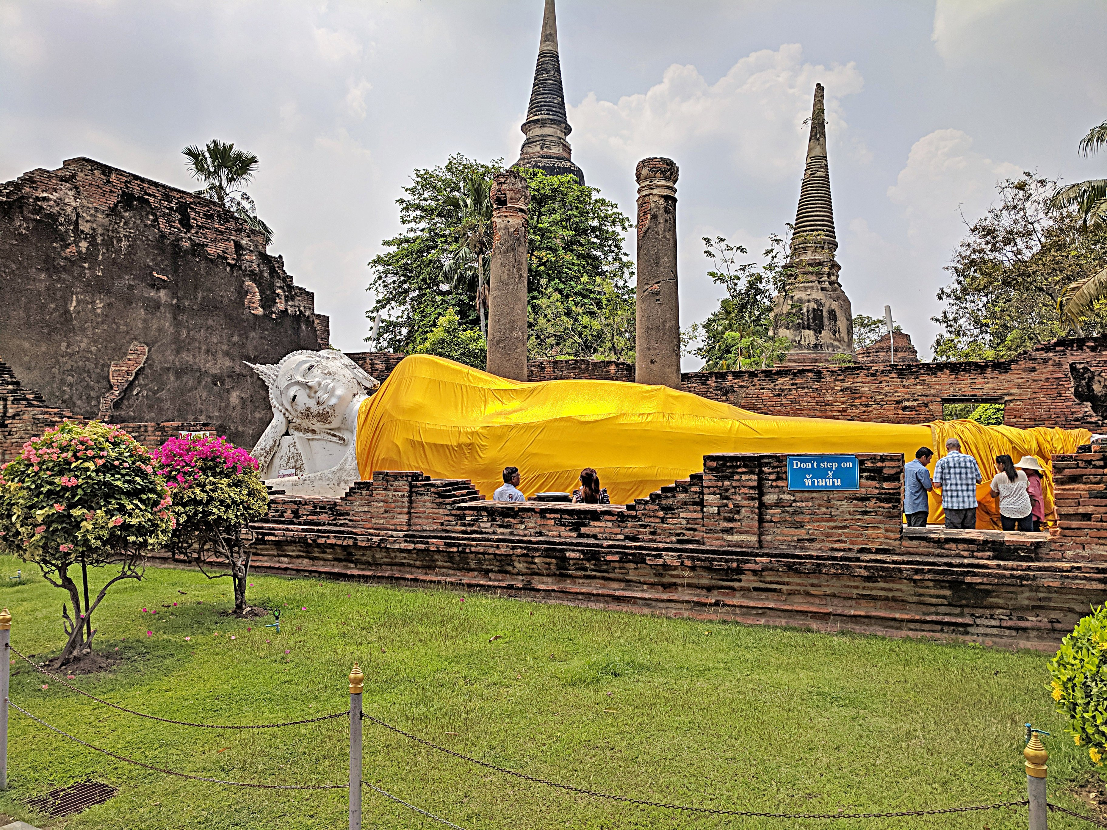 liegender Buddha im Wat Yai Chai Mongkhol, Ayutthaya